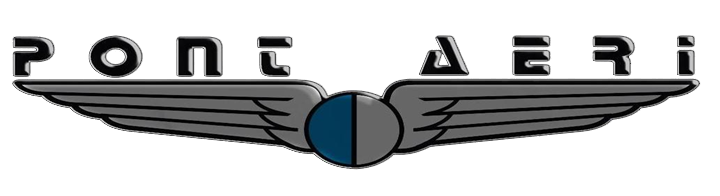 logo du Pont Aeri